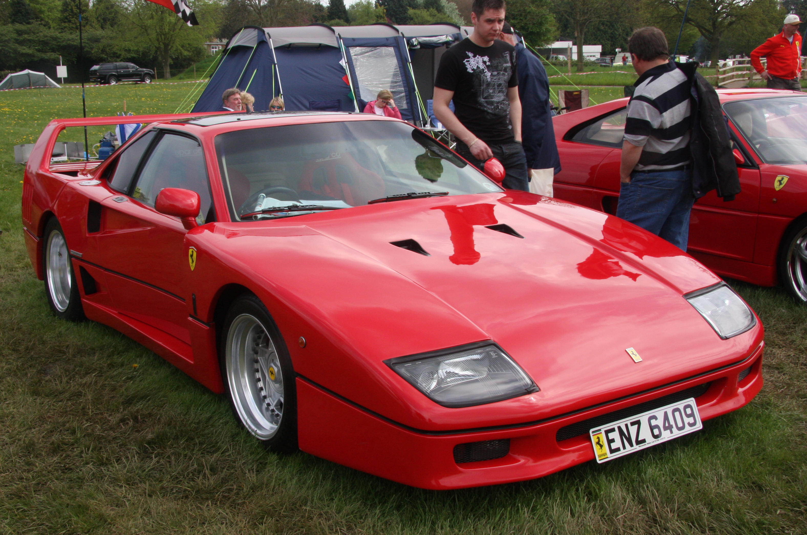 Xillion Ferrari F40 replica